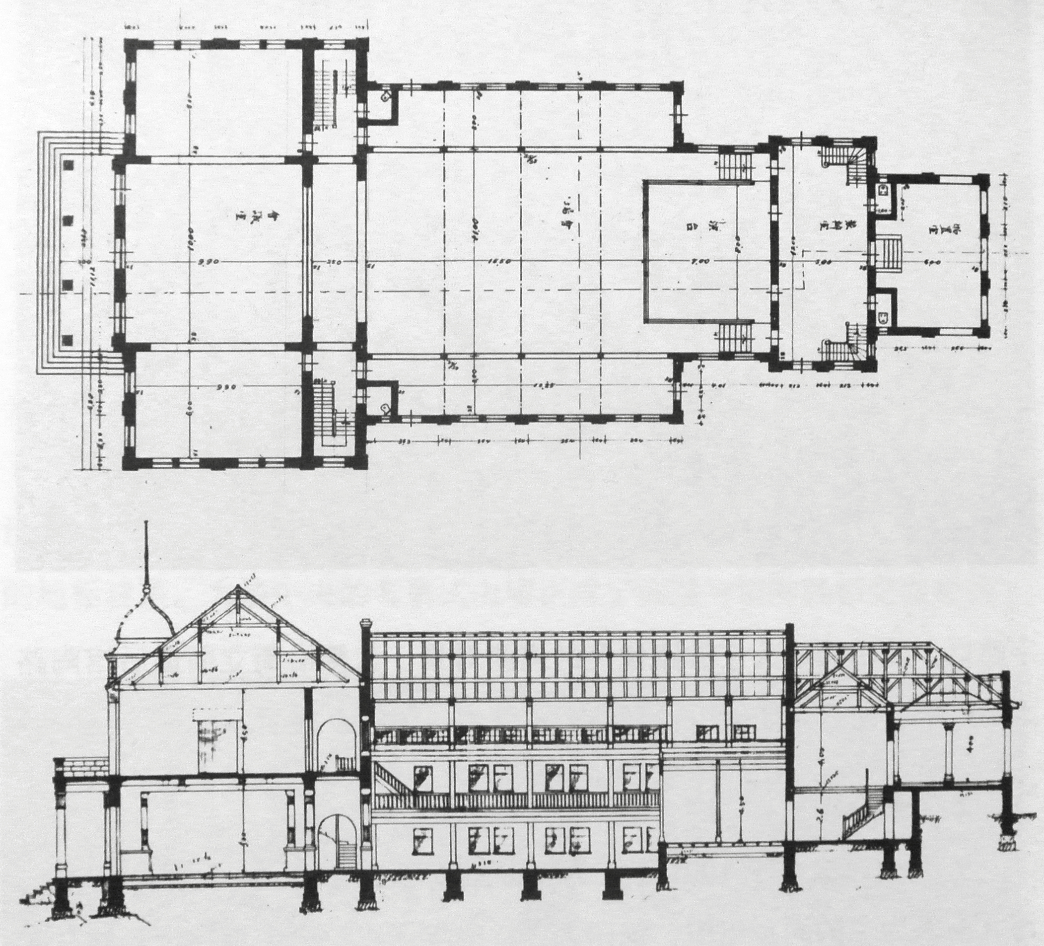 青岛齐燕会馆设计图